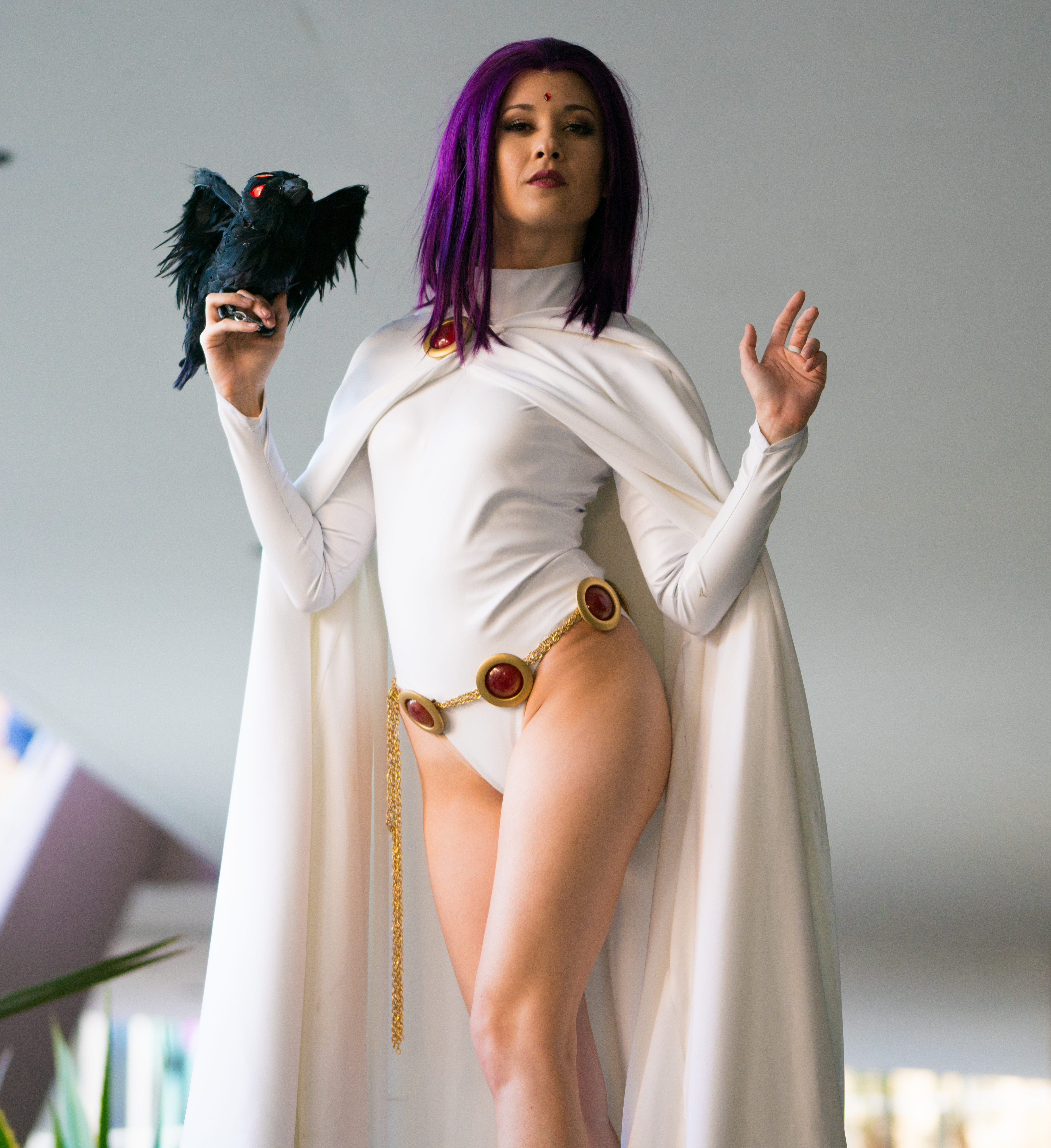 Cosplayer como Raven. Long Beach Comic Expo day 2-133